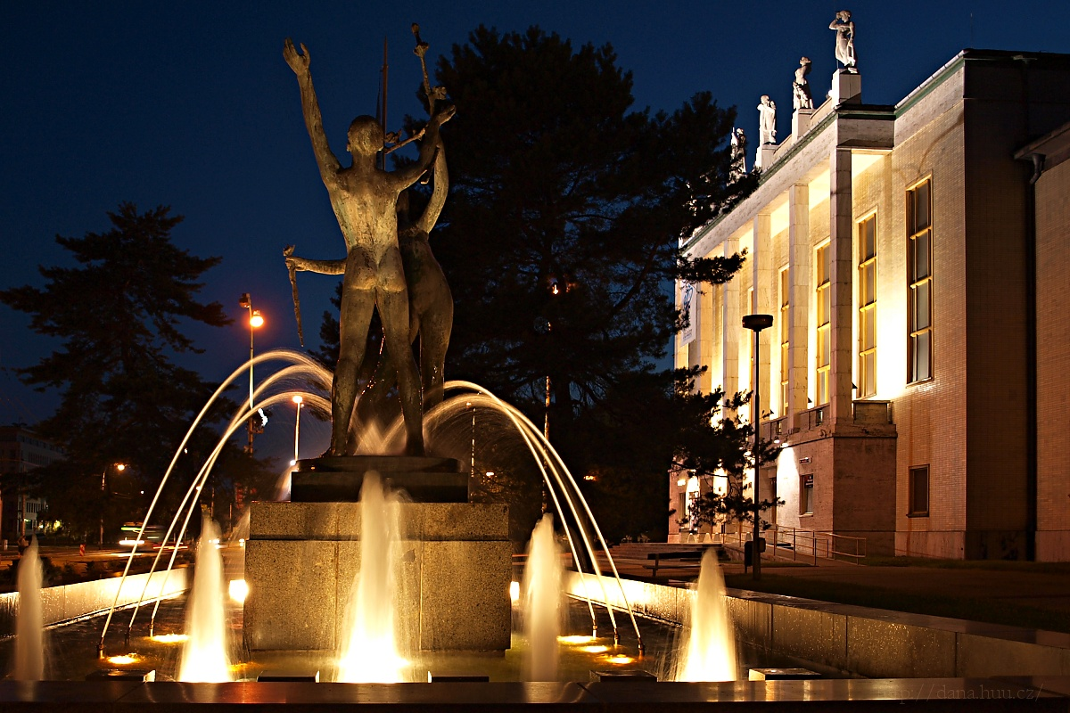 DK Ostrava